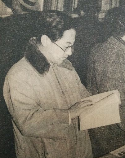 松方三郎